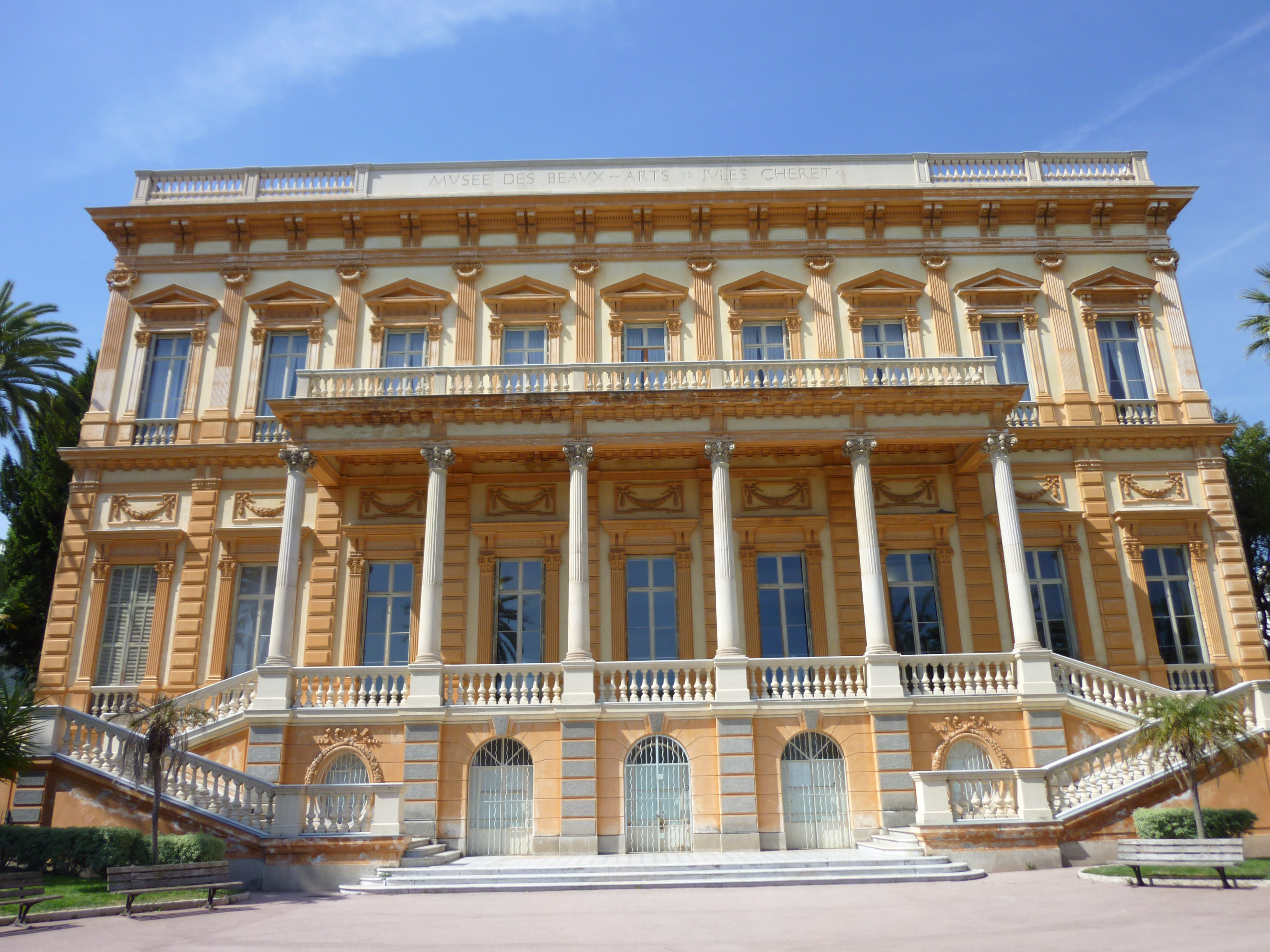 Villa Thomson, actuel musée des beaux-arts Jules Chéret, (Nice, Alpes-Maritimes, France) .